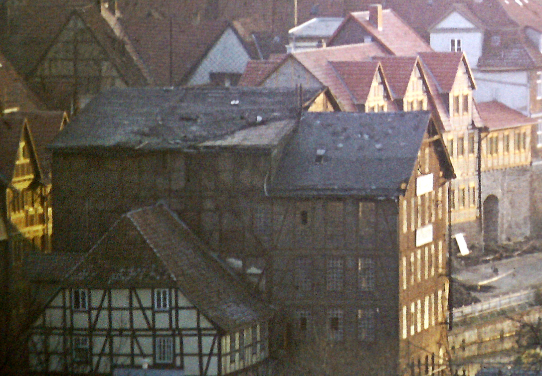 Graumühle in Hann. Münden